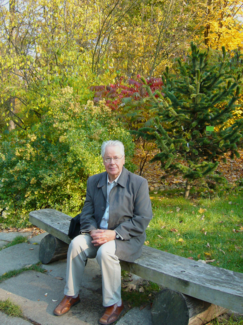 J. Such - poza filozofią, muzyką i szachami - uwielbia obcowanie z piękną przyrodą. Na łonie natury udawało się mu nieco odetchnąć i przemyśleć rozmaite sprawy, także te z zakresu filozofii. Zdjęcie: Botanik 2009 r.